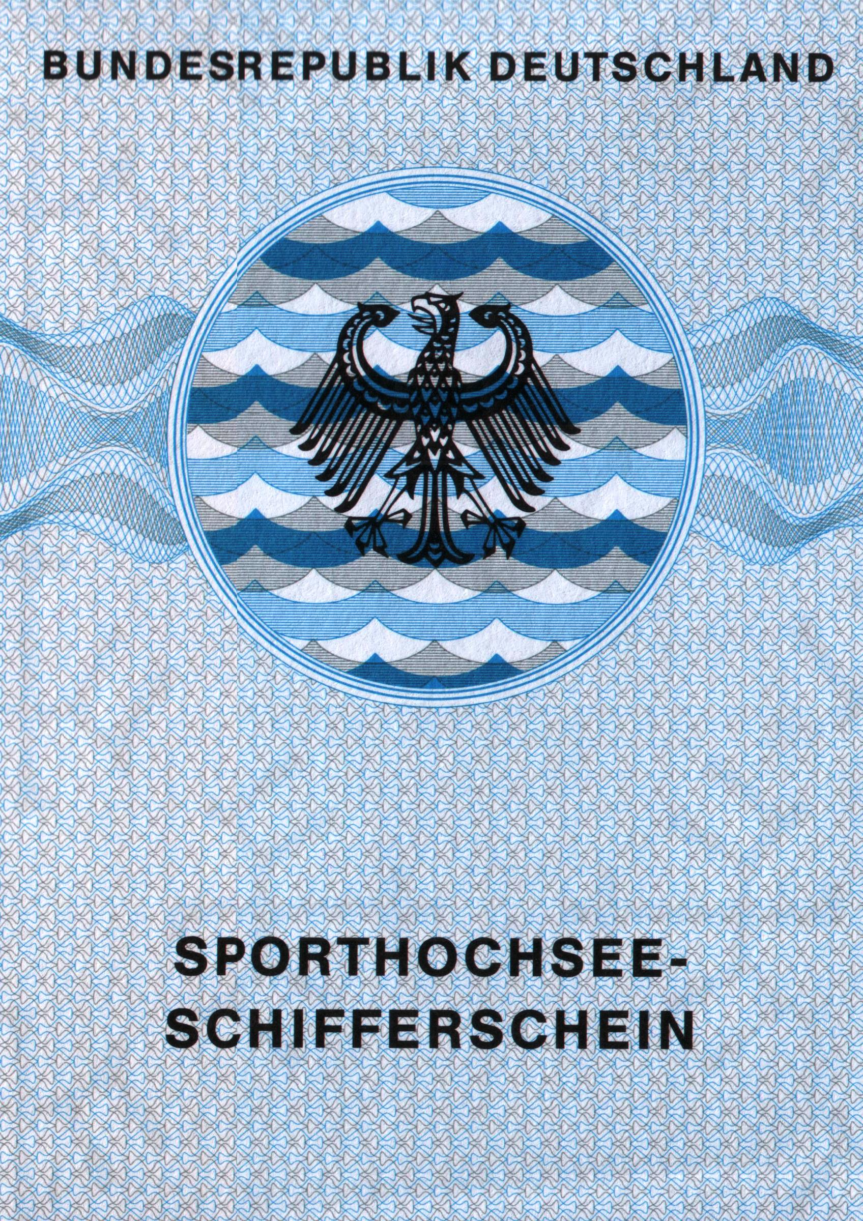 Sporthochseeschifferschein